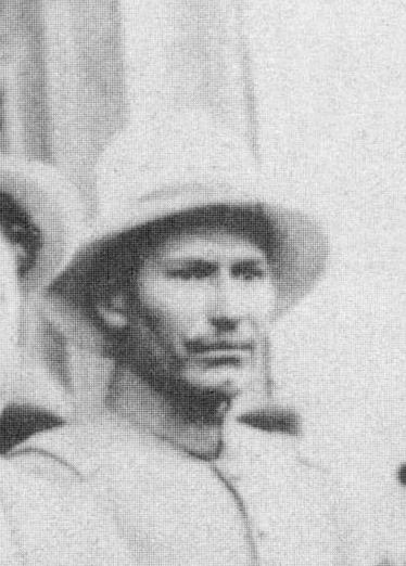 El general Panfilo Natera